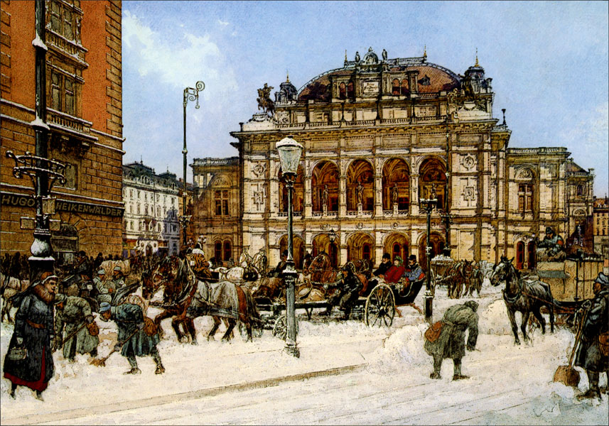 Staatsoper Wien im Winter 1917, Vienna Opera House 1917